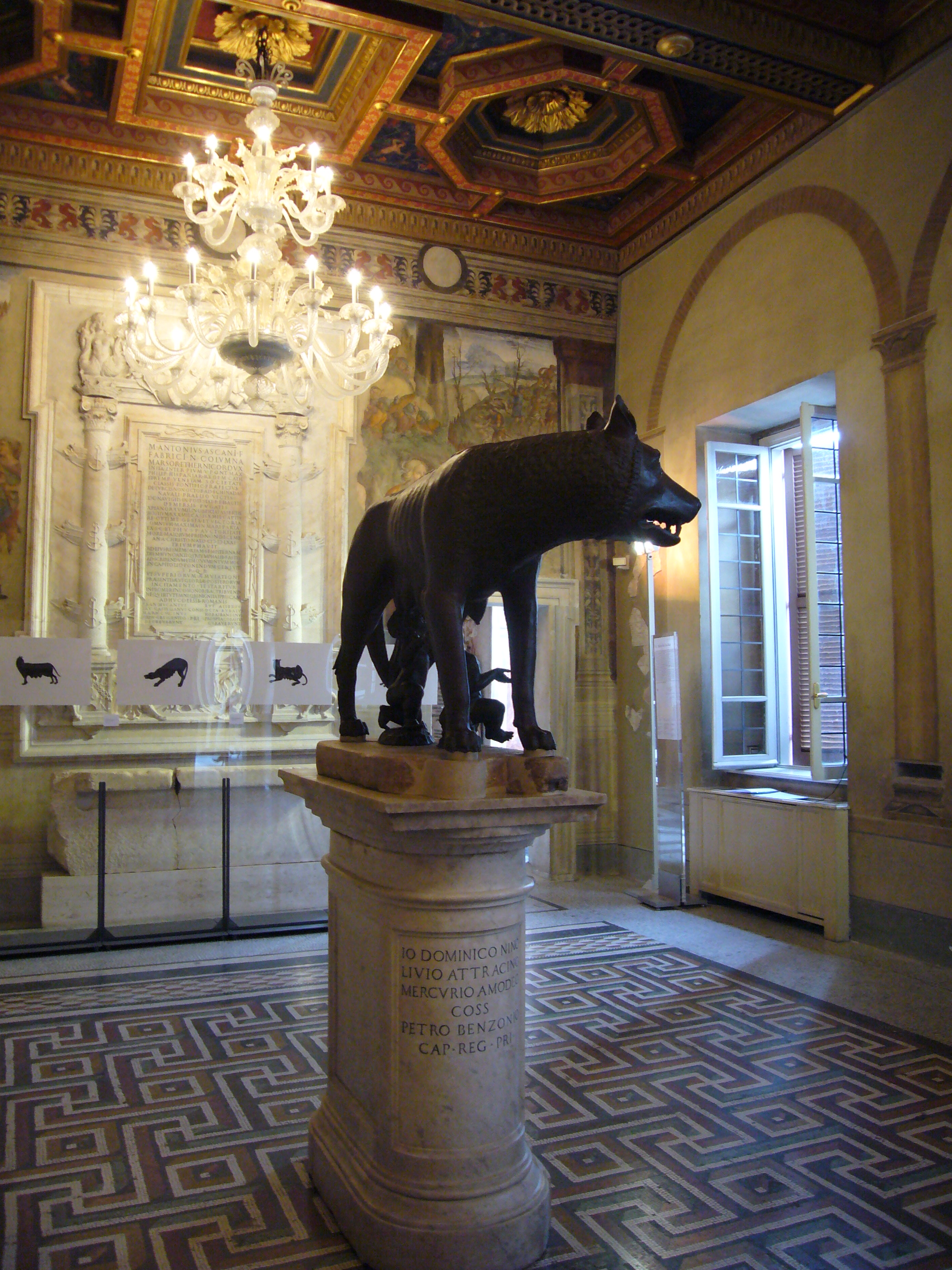 Roma, Palazzo dei Conservatori al Campidoglio, appartamento dei Conservatori, sala della Lupa: la lupa capitolina